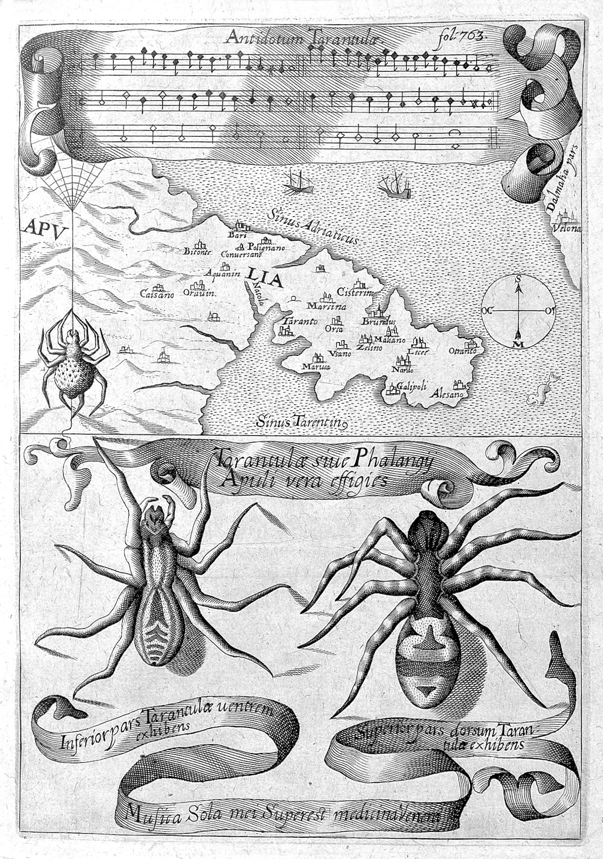 Rare Books